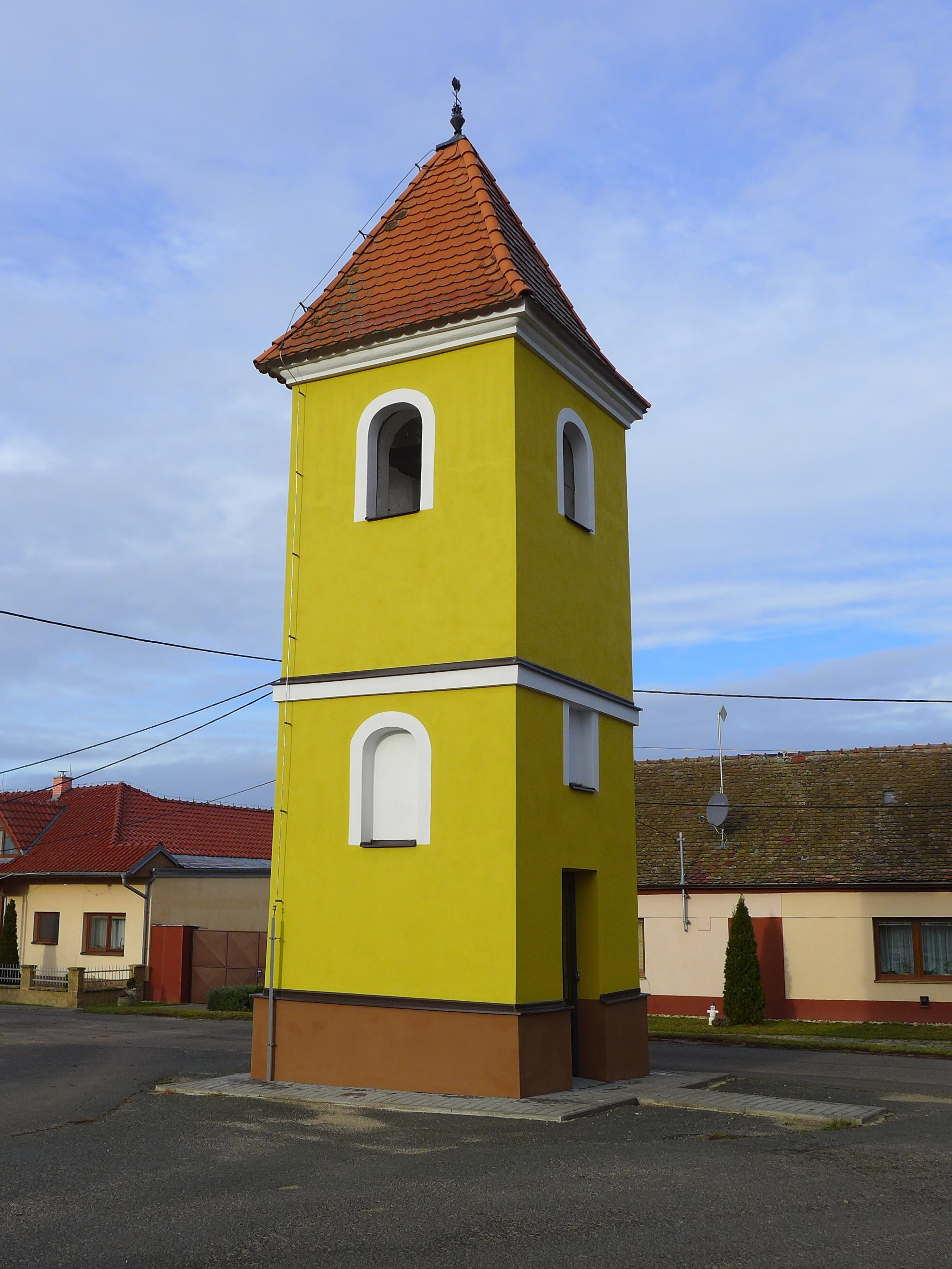 Zvonička, západní okraj obce, Na vinohrádkách, Branišovice.